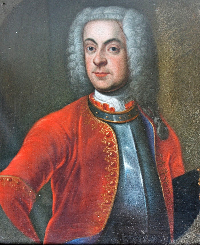 Graf Anton Franz von Wolkenstein-Trostburg (1698 bis 1750), Stifter des Wolkenstein-Epitaphs in Schwetzingen, Kirche St. Pankratius. (Neffe des Verstorbenen)